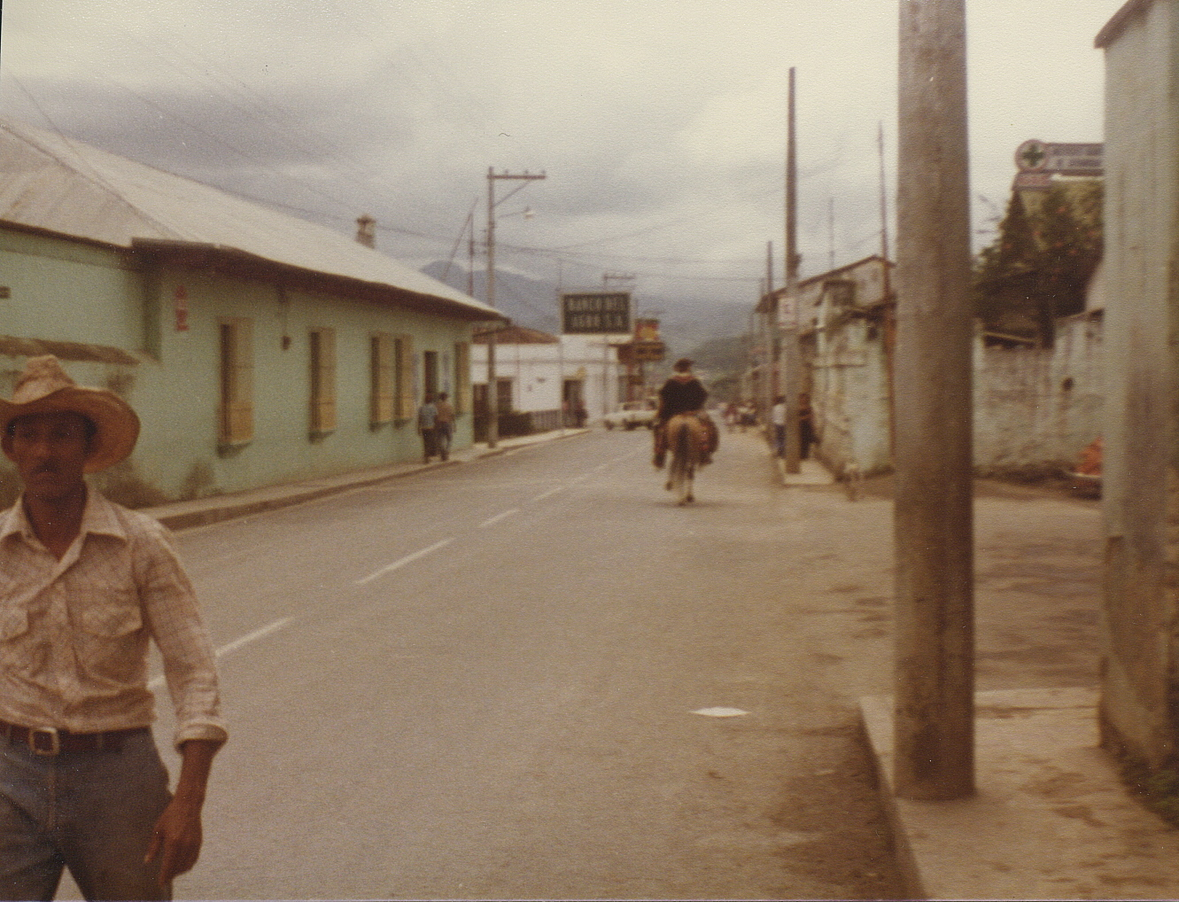 Coban, Guatemala.